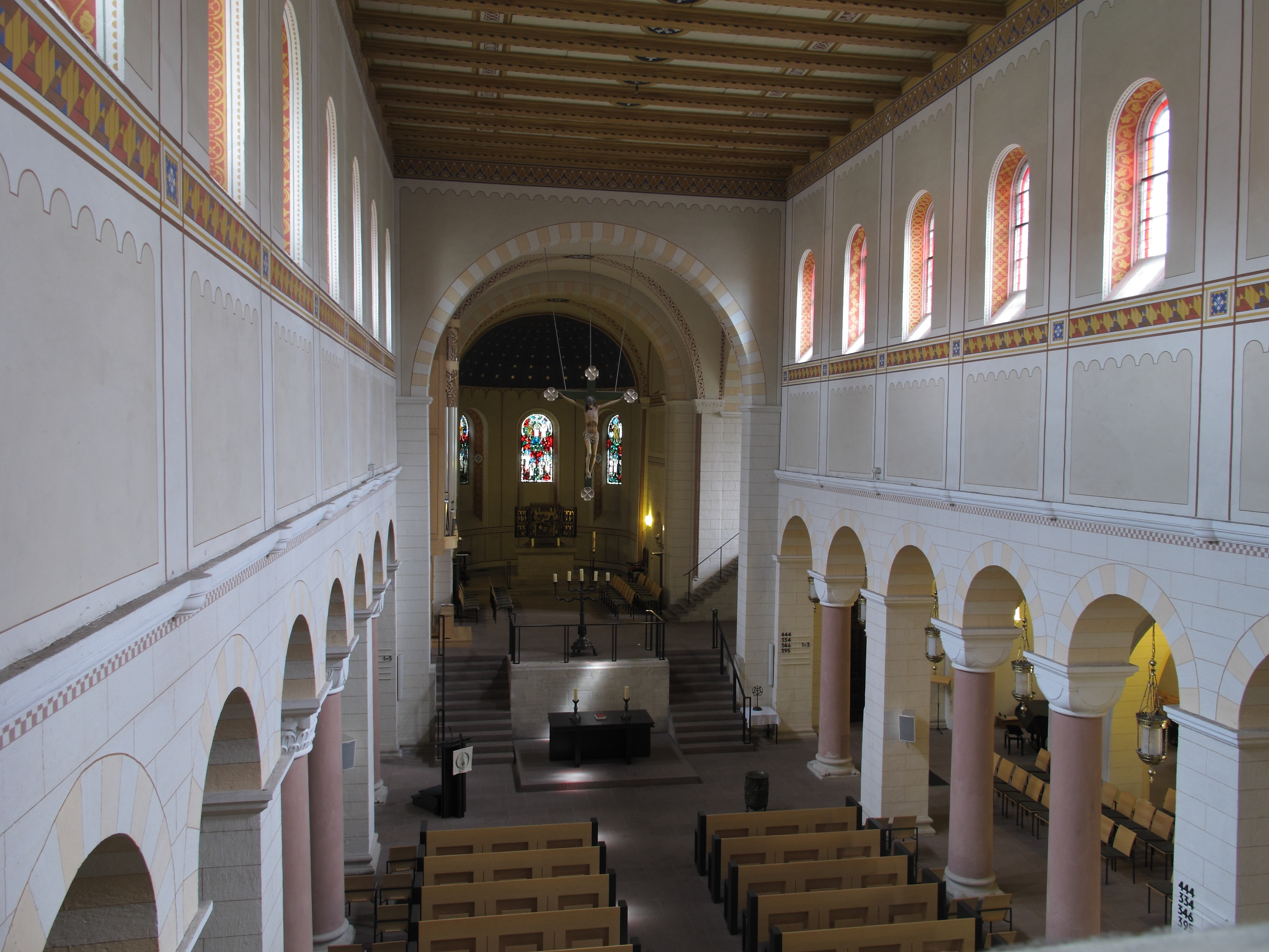 Bad Gandersheim: Stiftskirche, Innenansicht